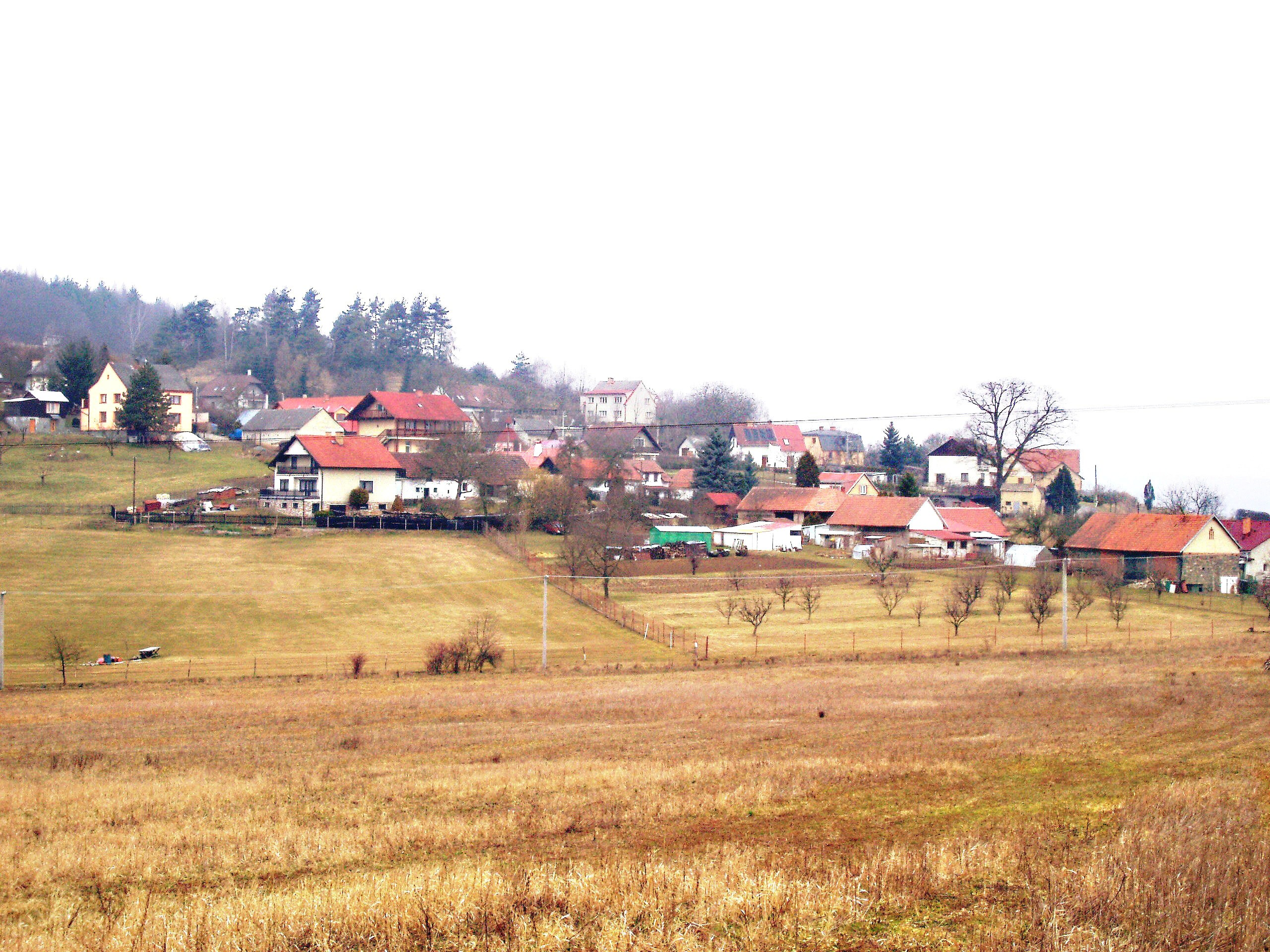 Nepřejov - celkový pohled